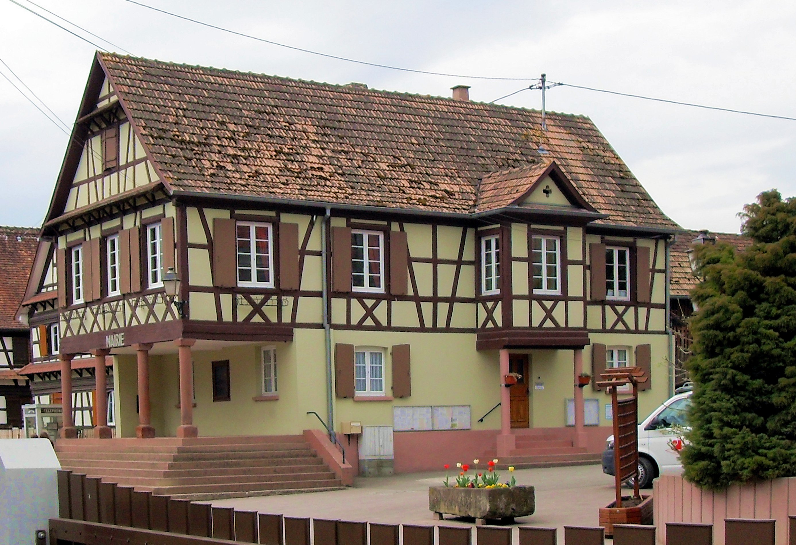 La mairie d'Uttenheim, côté est